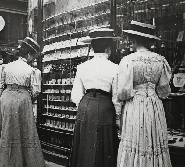 Vor dem Juweliergeschäft Brüder Zirner, Graben 7, Wien